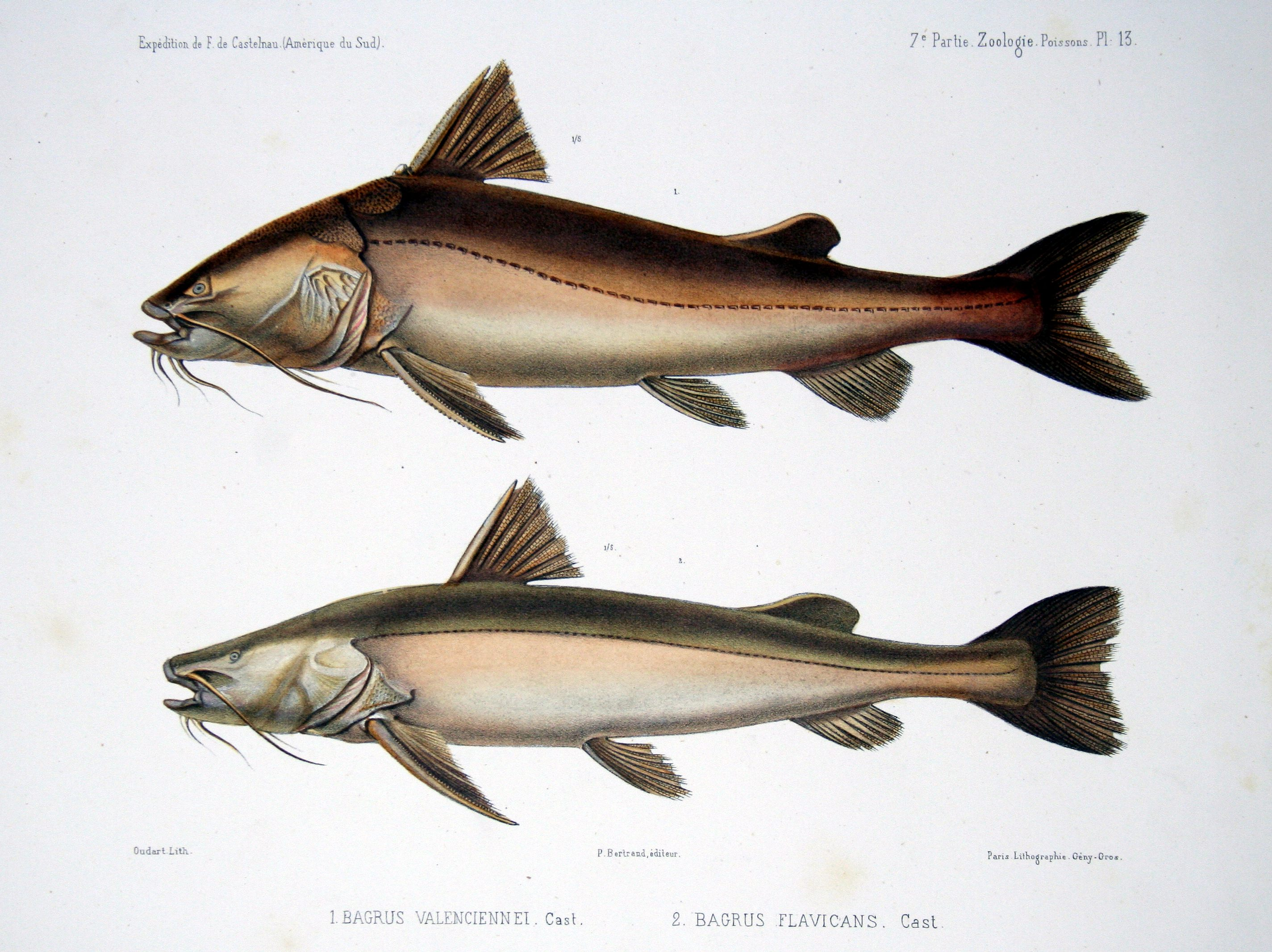 From top to bottom: Bagrus valenciennei Cast. = Ariidae cf. Sciades, Notarius Bagrus flavicans Cast. = Zungaro zungaro (Humboldt, 1821)